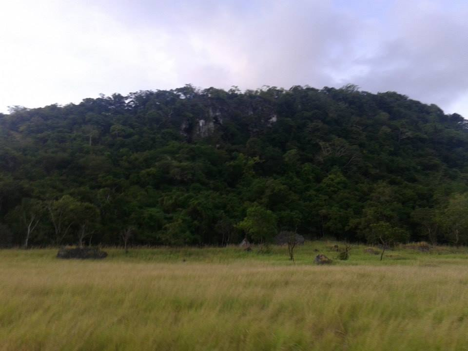 Atauro